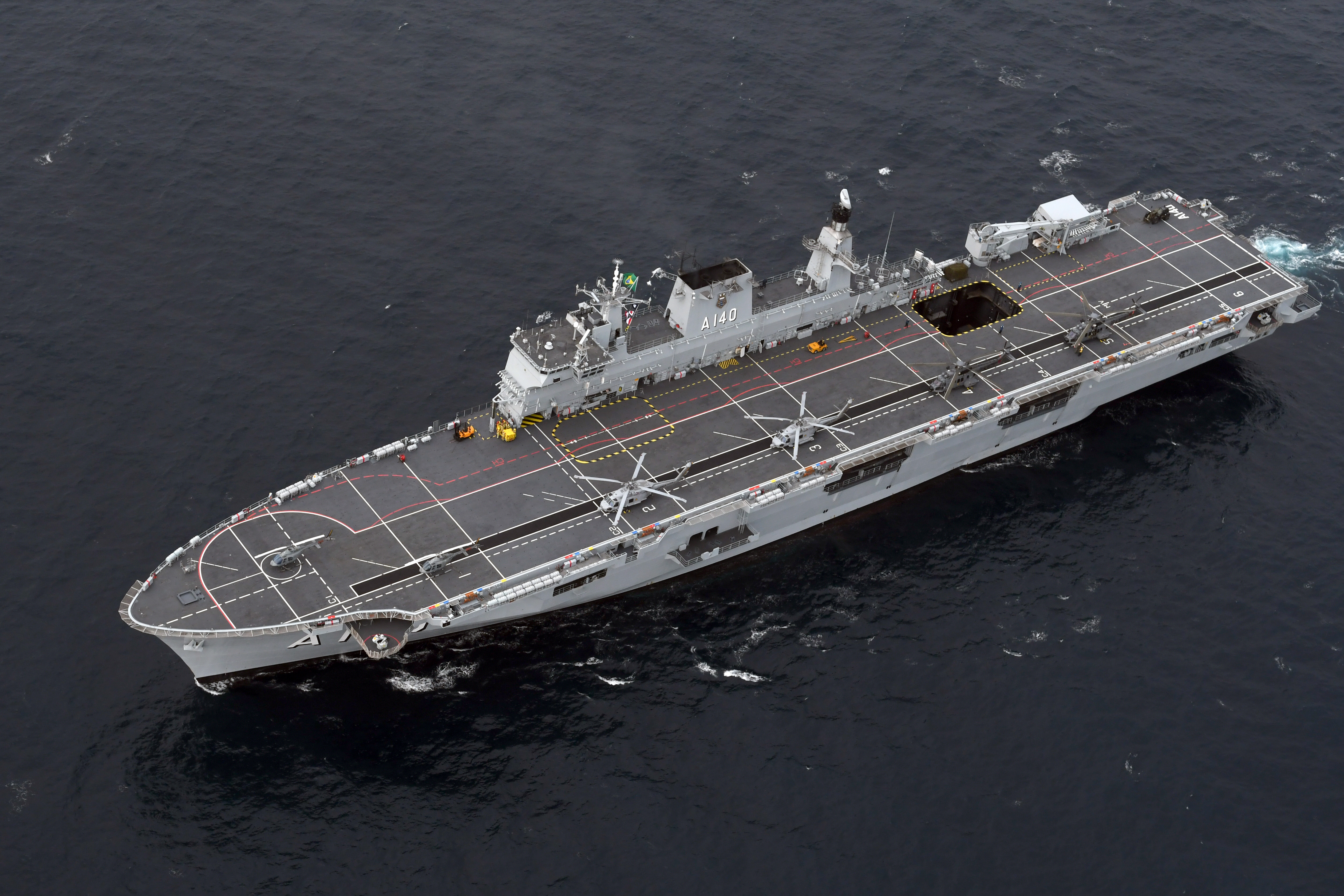 Crédito: Alexandre Durão/Revista Força Aérea Arquivo liberado pela Marinha do Brasil através de projeto GLAM com Wiki Educação Brasil